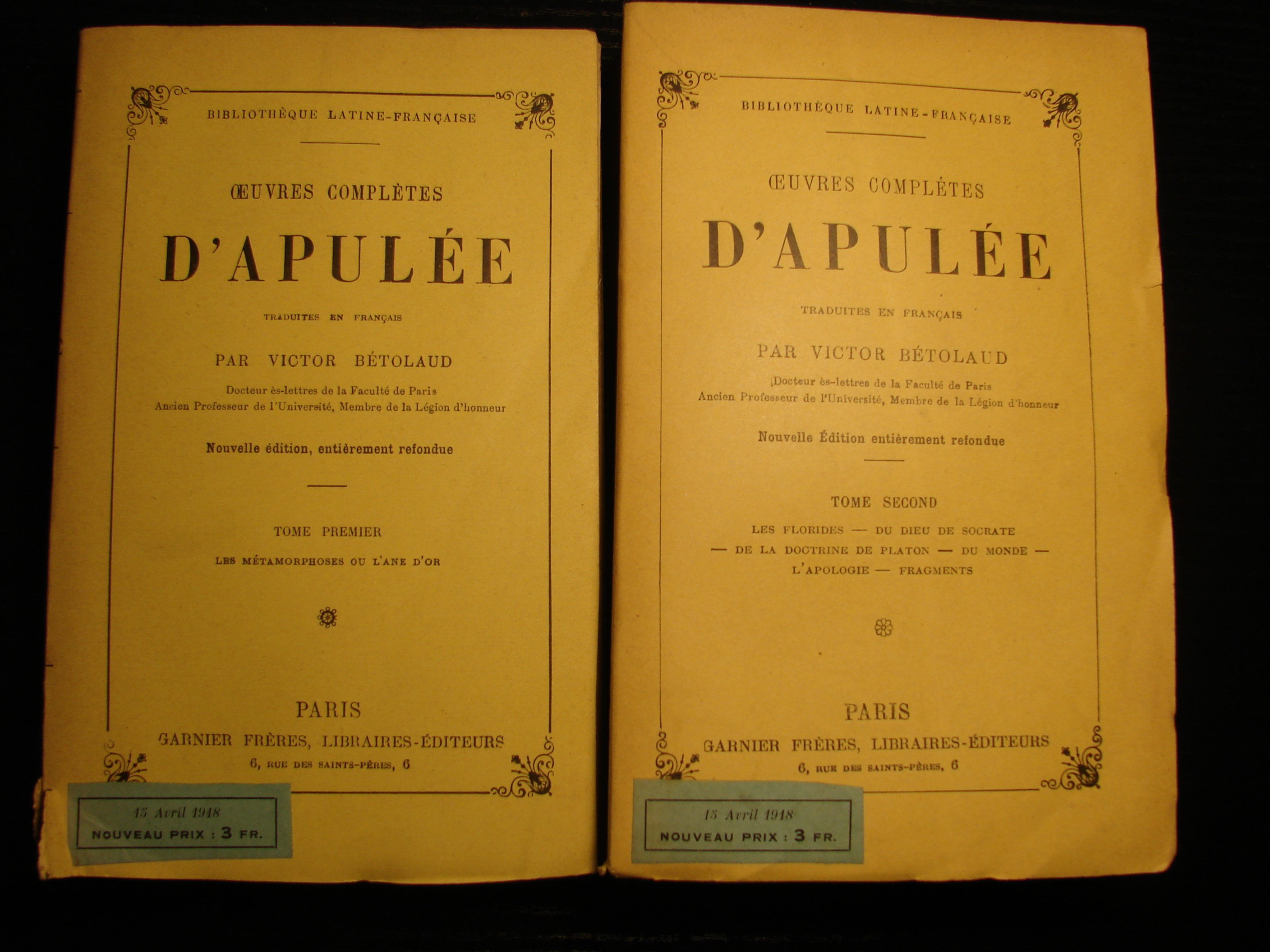 Oeuvres complètes d'Apulée, éd. Garnier Frères, Paris, 1862.